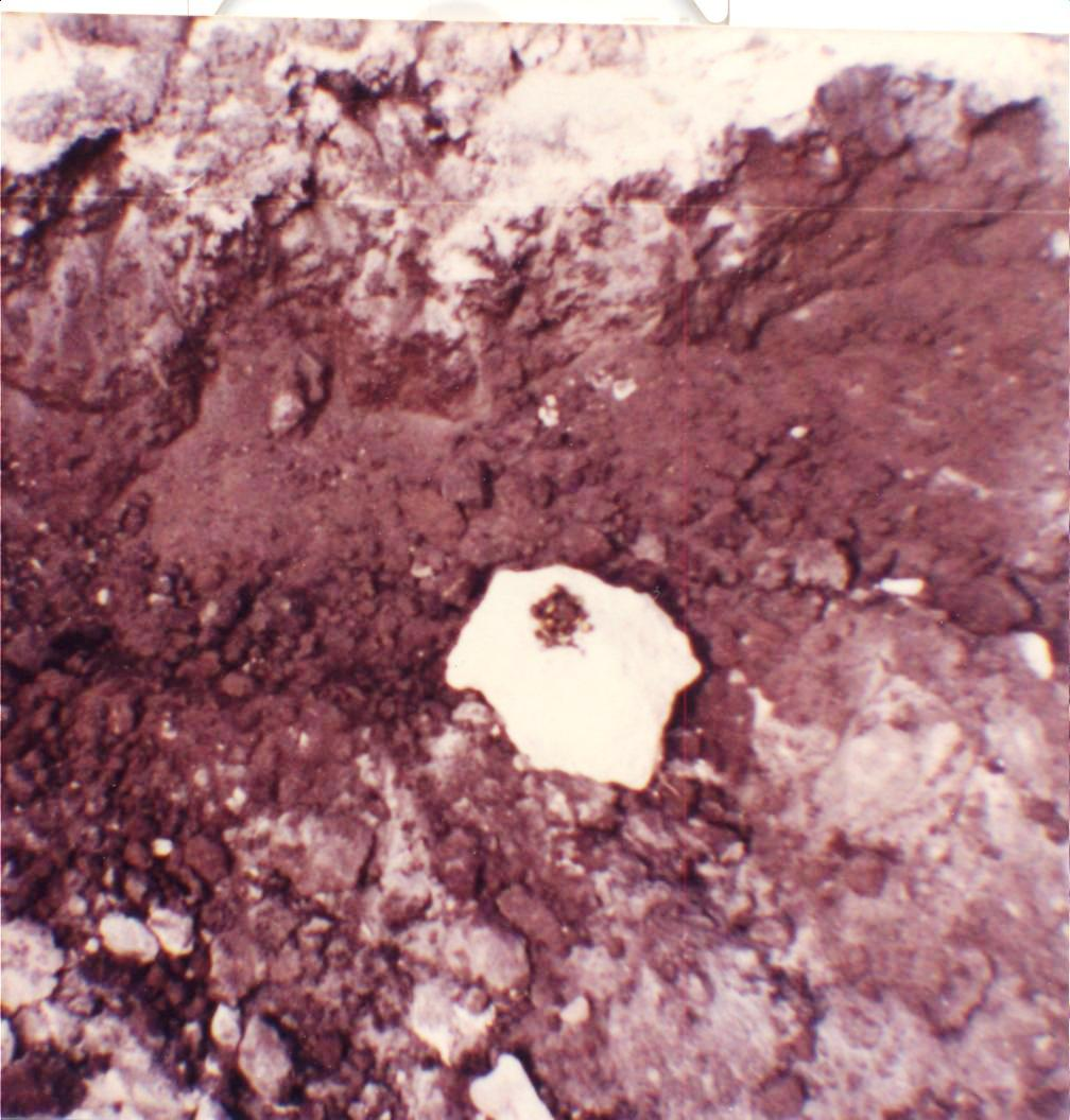 תרכובת גופרית